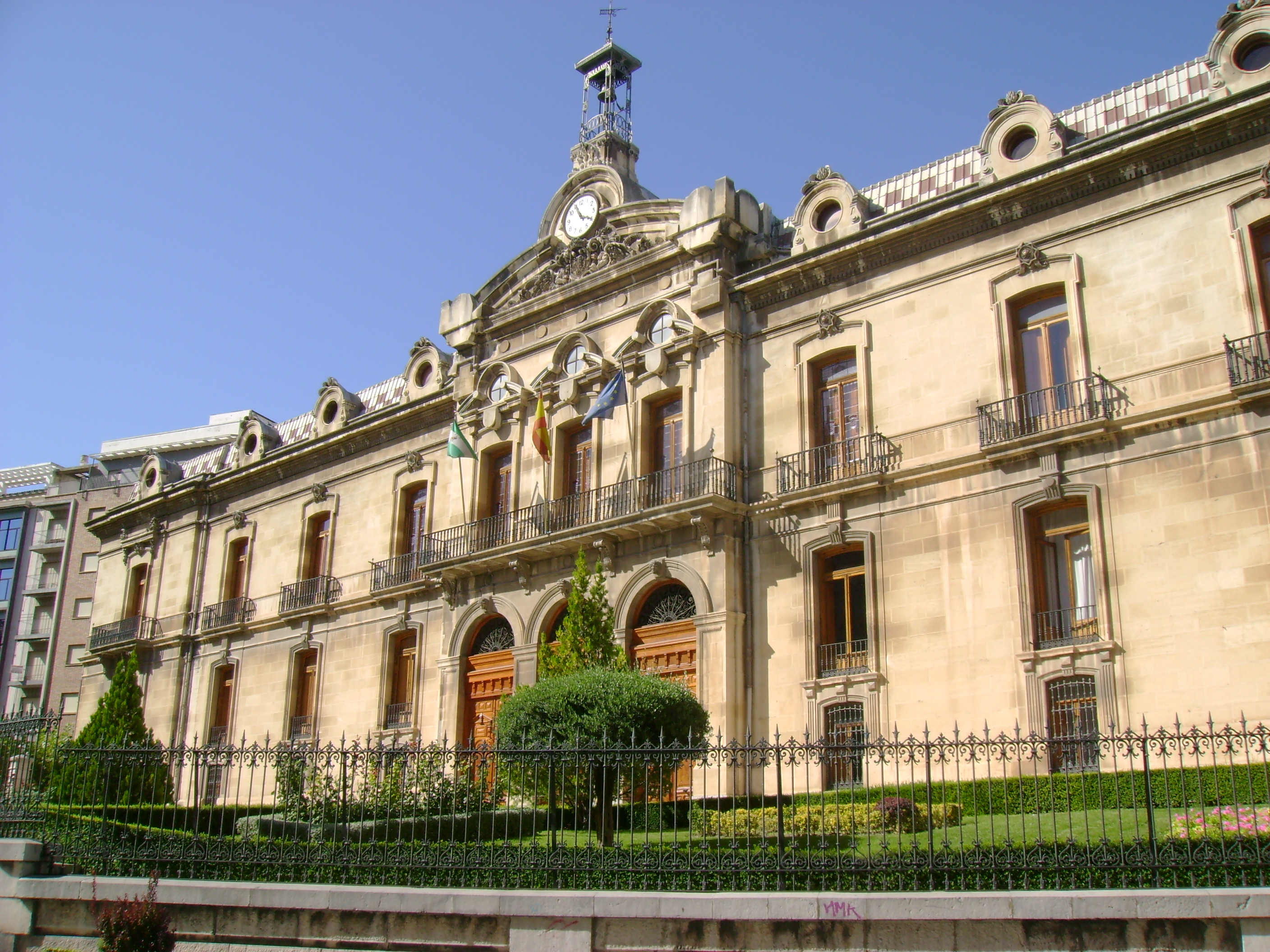 Palacio de la Diputación Provincial de Jaén.